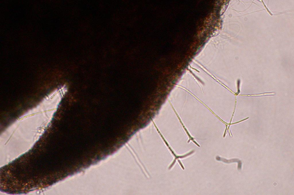 Tetrachaetum elegans 水生不完全菌 2003.11.13：和歌山県すさみ町 水中落葉を室内で培養したものから